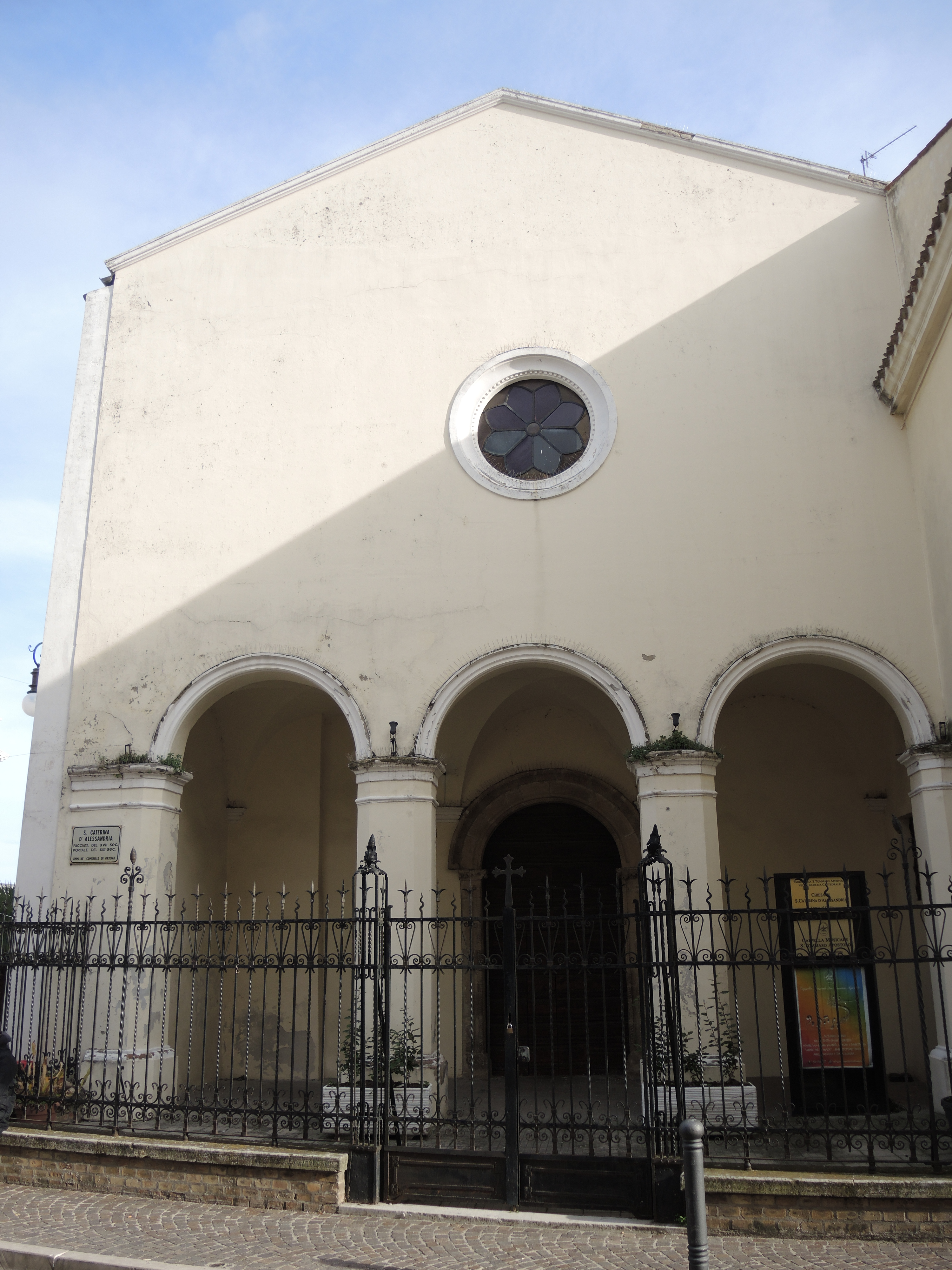 Ortona: Chiesa di Santa Caterina d'Alessandria